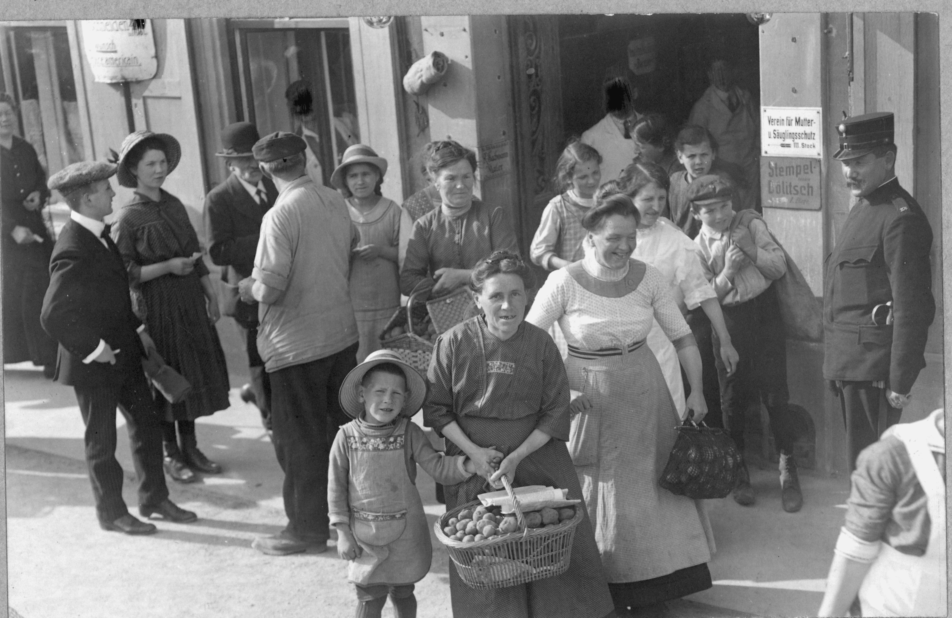 Oberer Mühlesteg 6, Zürich, Schweiz, 1916